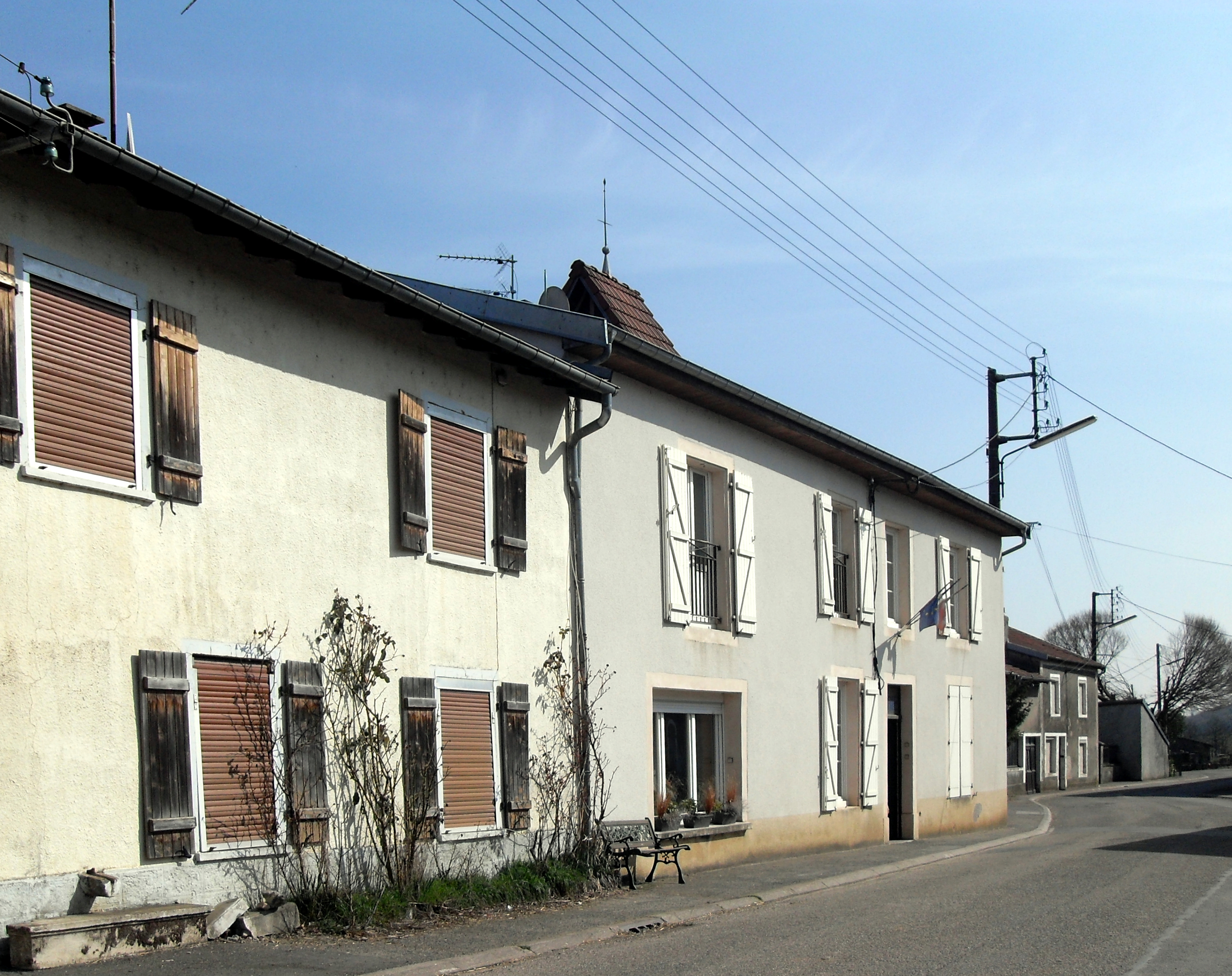 La mairie de Jevoncourt